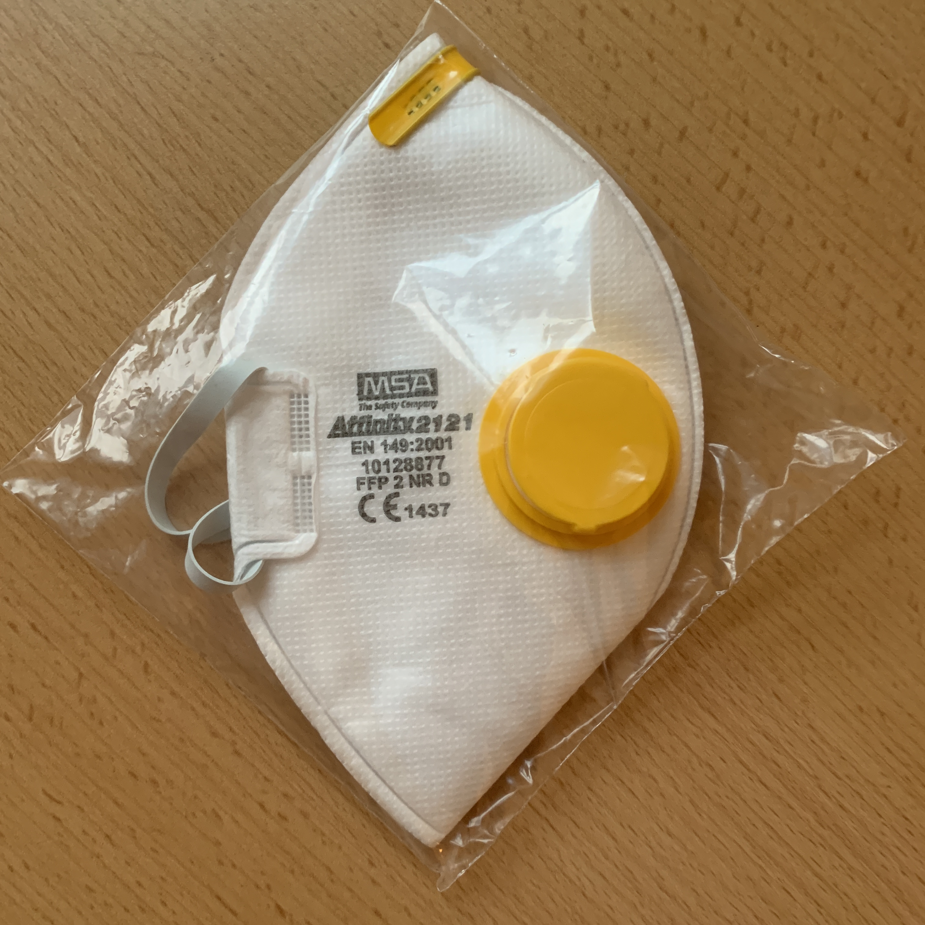 Mundschutz (OVP) FFP2